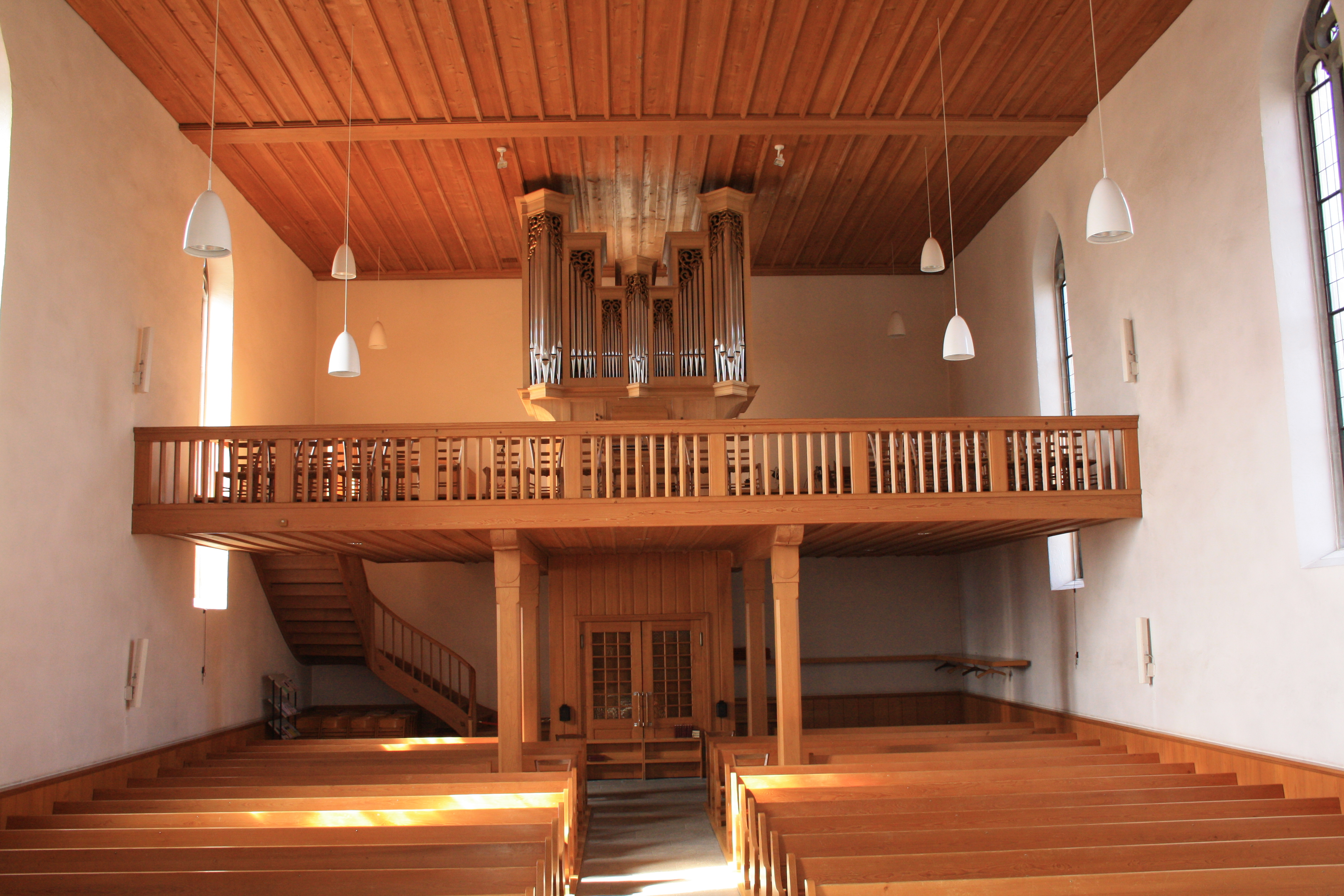 Reformierte Kirche Suhr